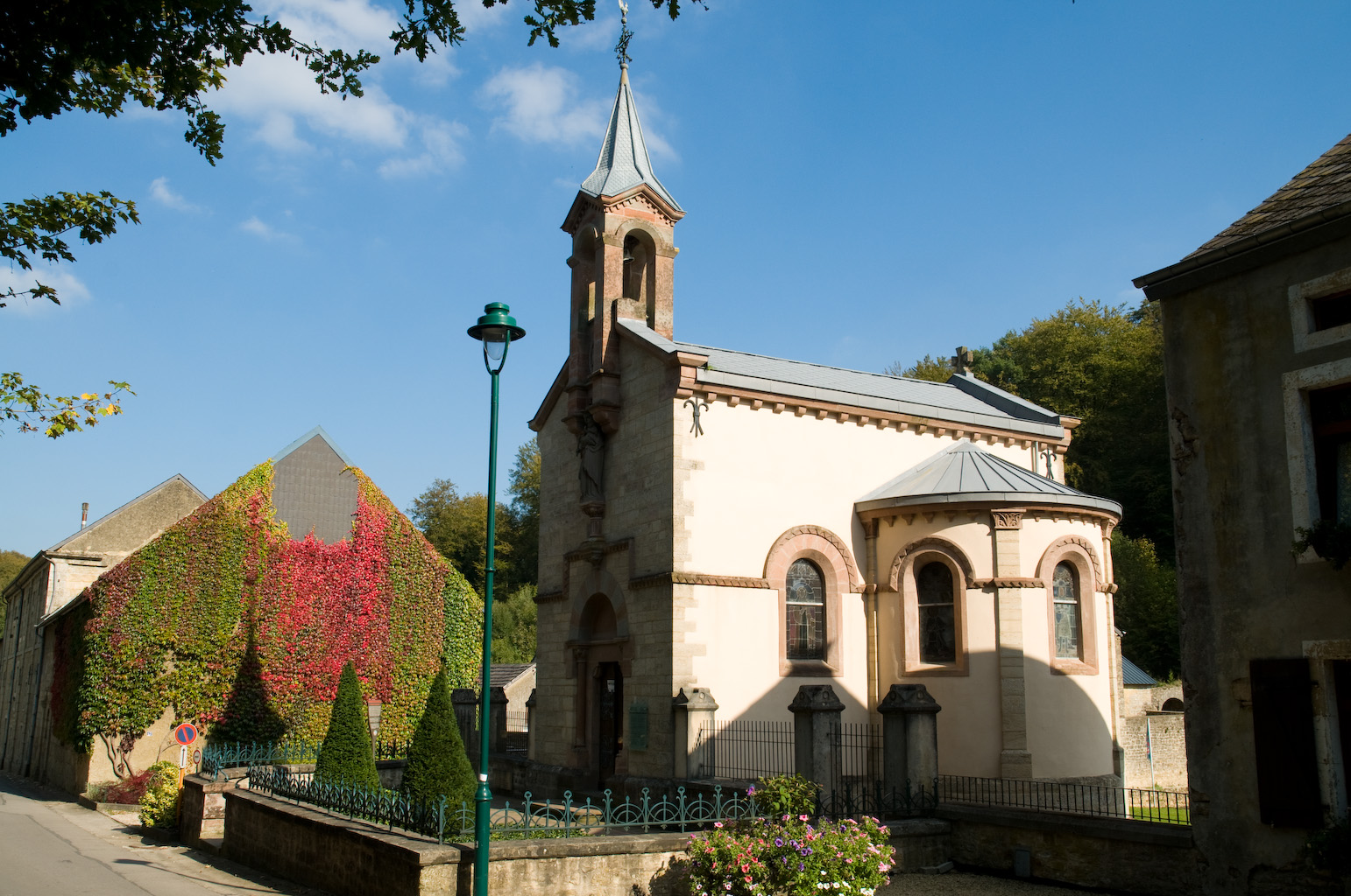 Vorderseite der Abtei von Clairfontaine